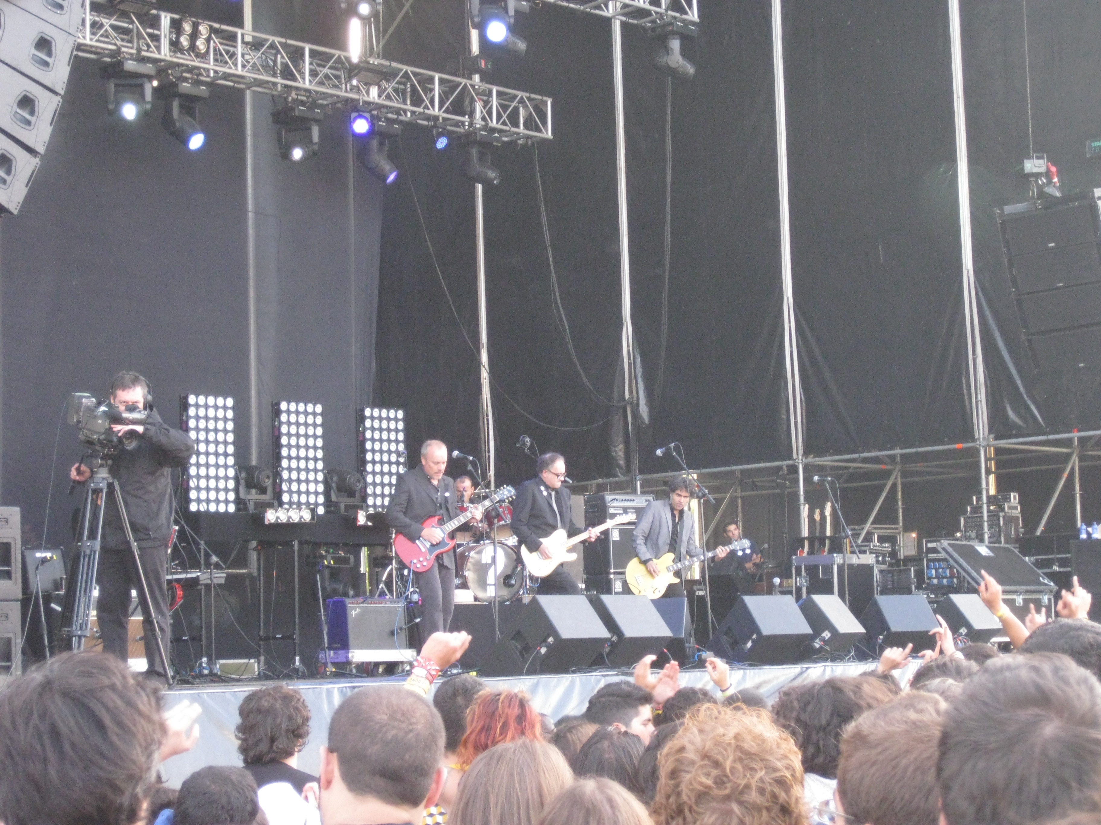 A banda galega Siniestro Total no festival Rock in Way de Santiago de Compostela.